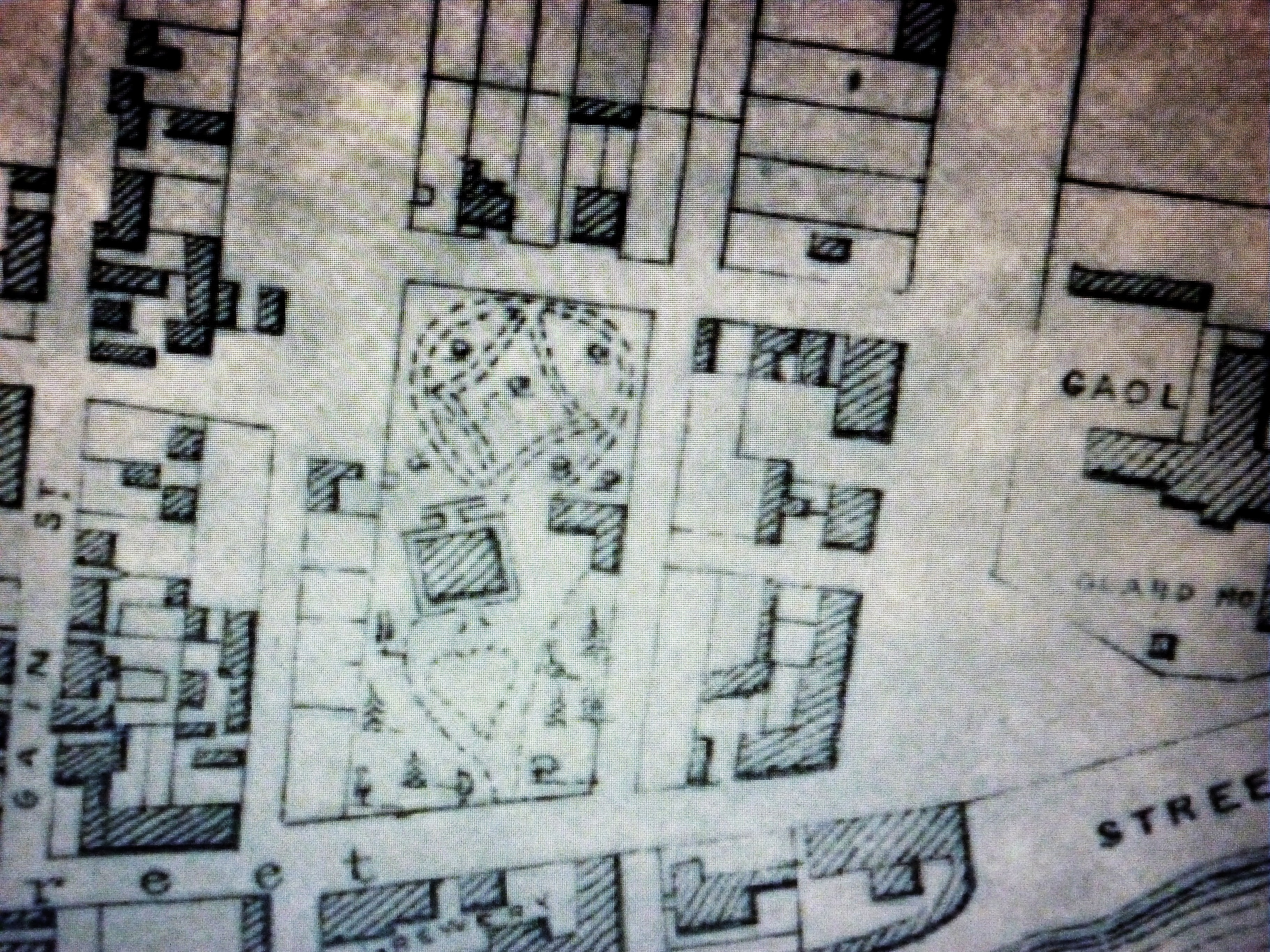 Document BANQ / Montreal Map: James Cane, 1846. Le nom de rue Érié n'est pas mentionné ici mais son tracé est nettement représenté: il bornait au Nord, un domaine aménagé, où la famille Molson avait fait construire une résidence cossue, détruite lors du grand Incendie de 1852. À droite, on voit la prison "Au Pied du Courant" où on pendit les "Patriotes" de 1837.